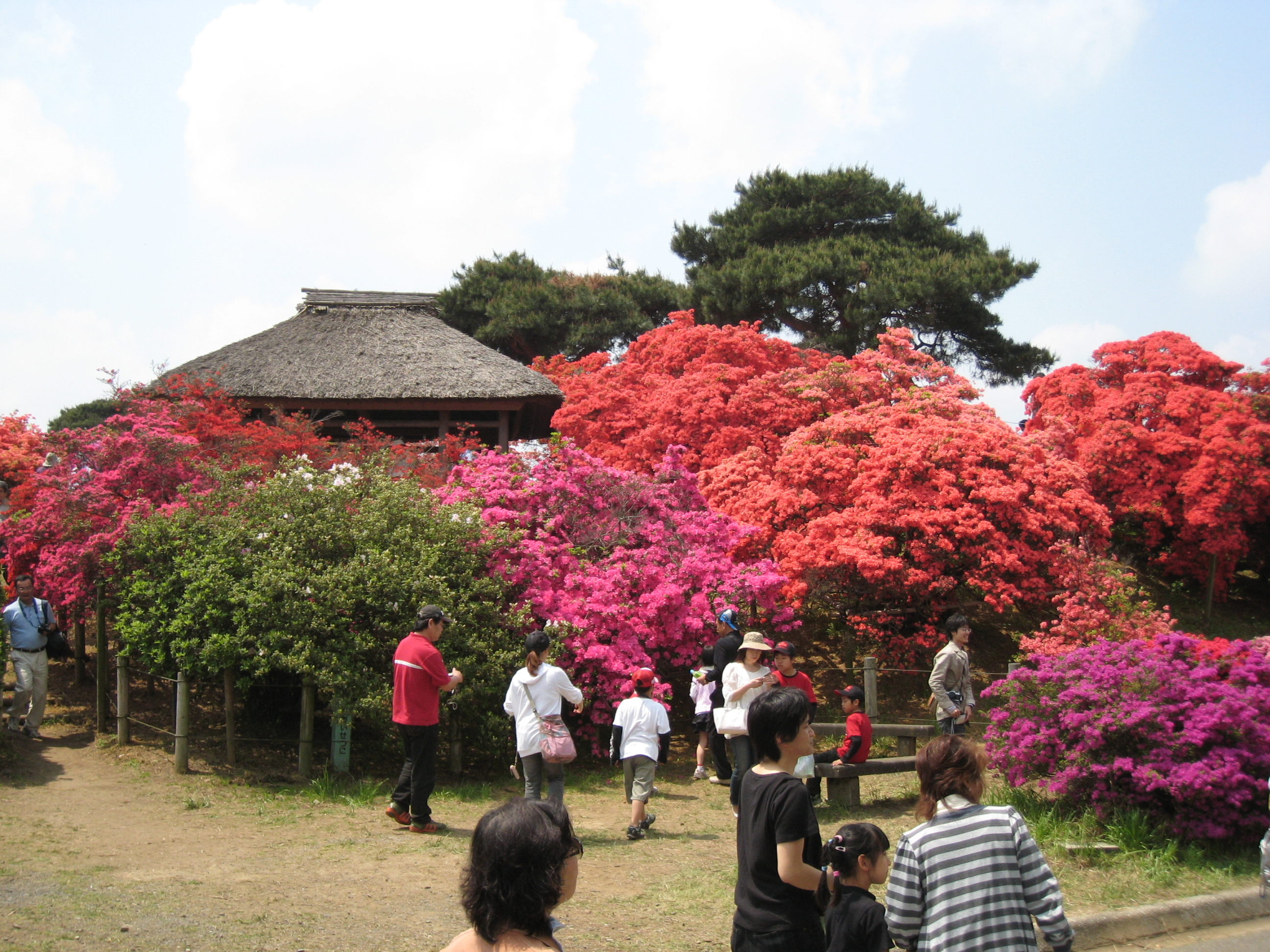 Tsutsujigaoka Koen, or Azalea Park in Tatebayashi, Gunma Prefecture,Japan.